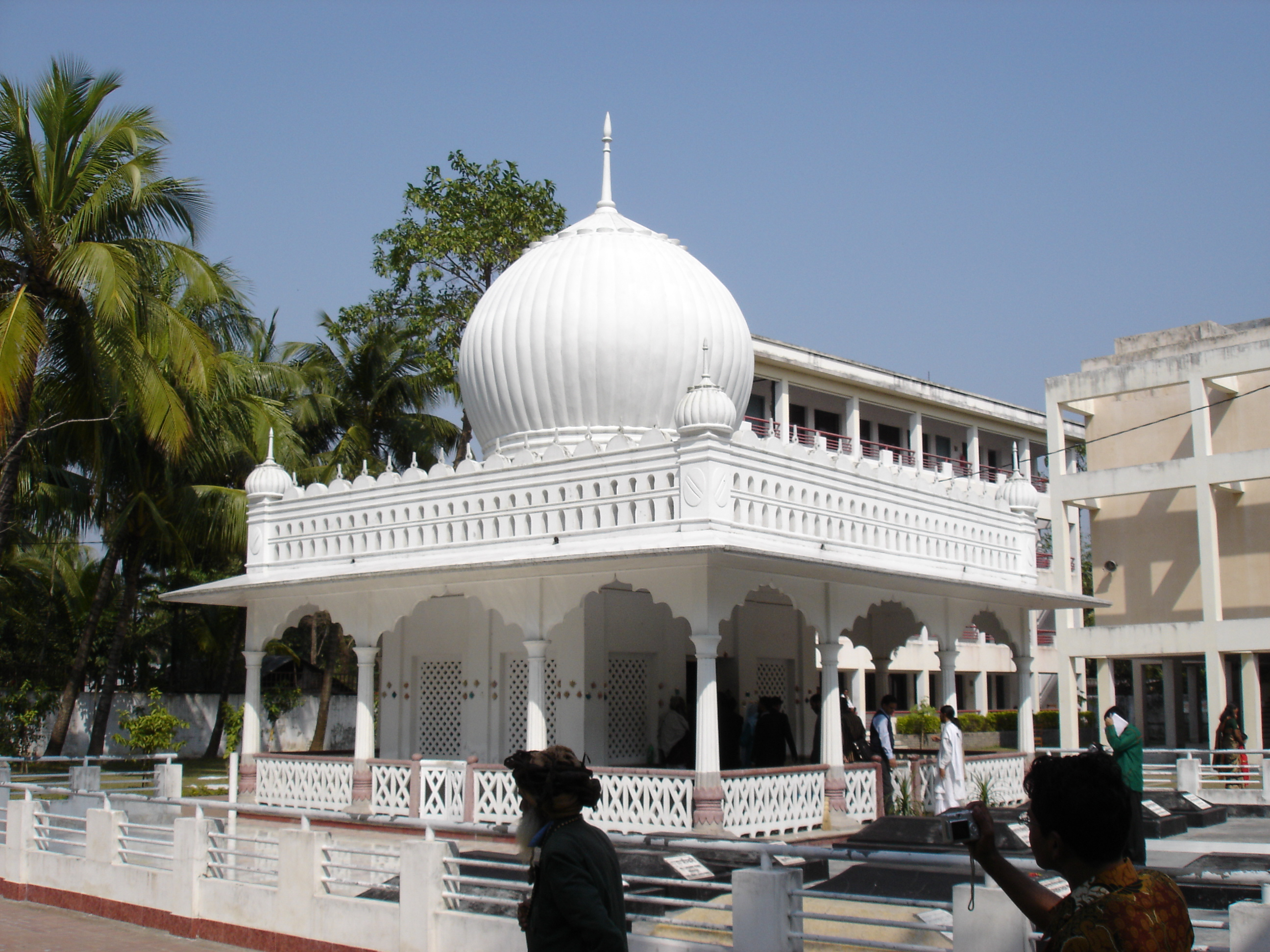 Lalan Shah Mazar, Kustia, Bangladesh.